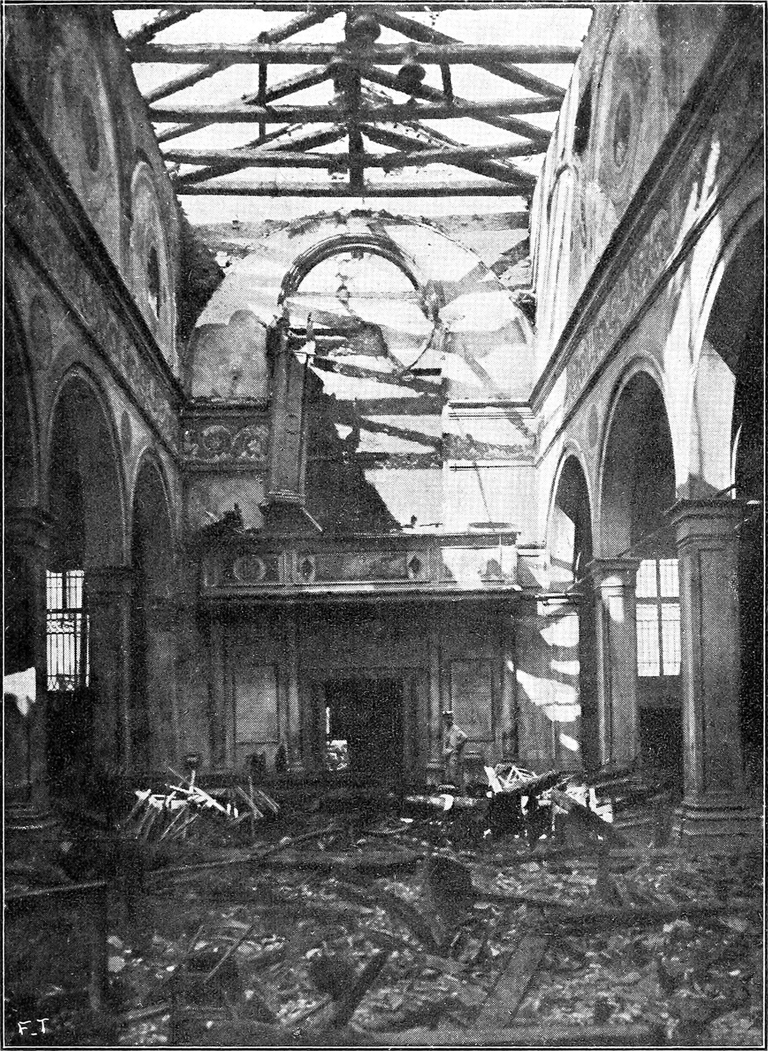 Illustrazione da Il martirio dei monumenti, di Ugo Ojetti - Milano, Fratelli Treves Editori, 1918.